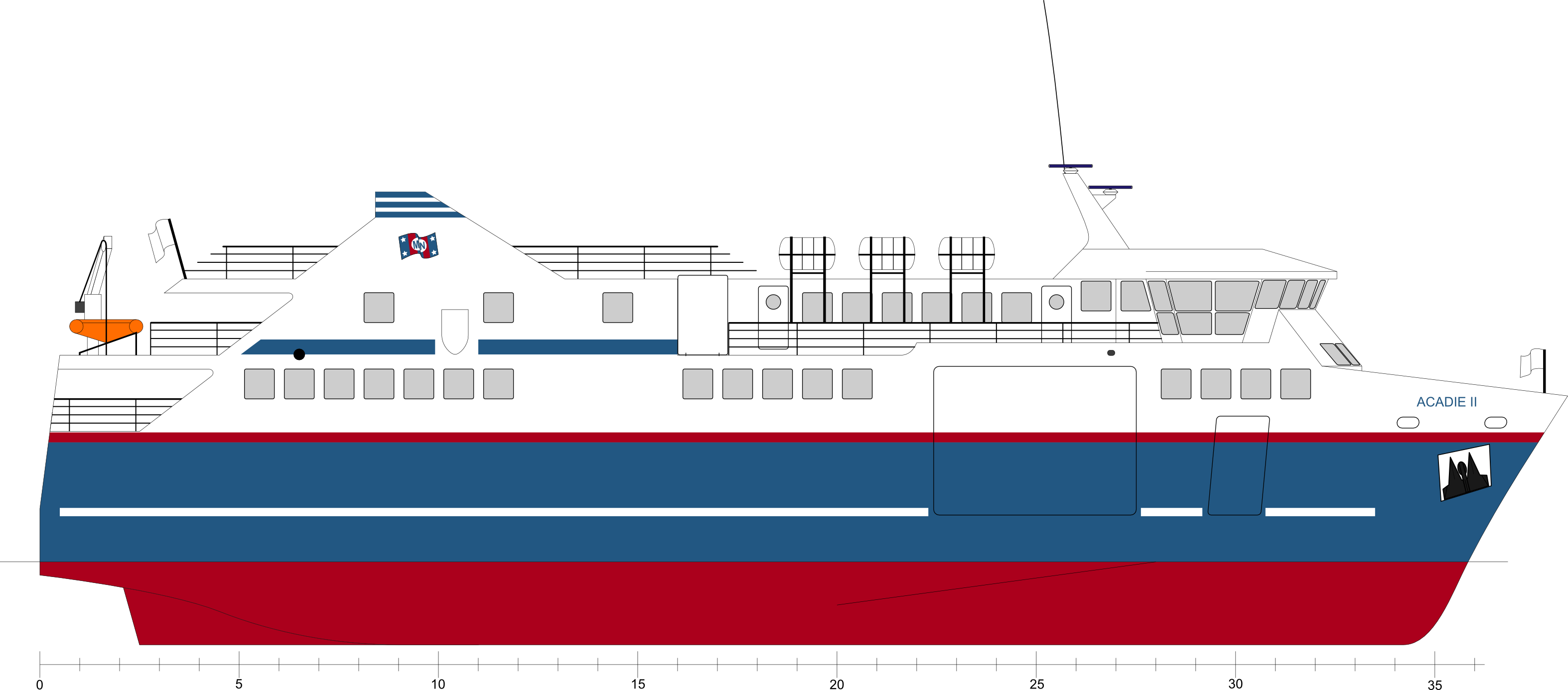 Avant-projet du roulier Bangor présenté en 2003 sous le nom "Acadie II", en référence au roulier Acadie qu'il doit remplacer.